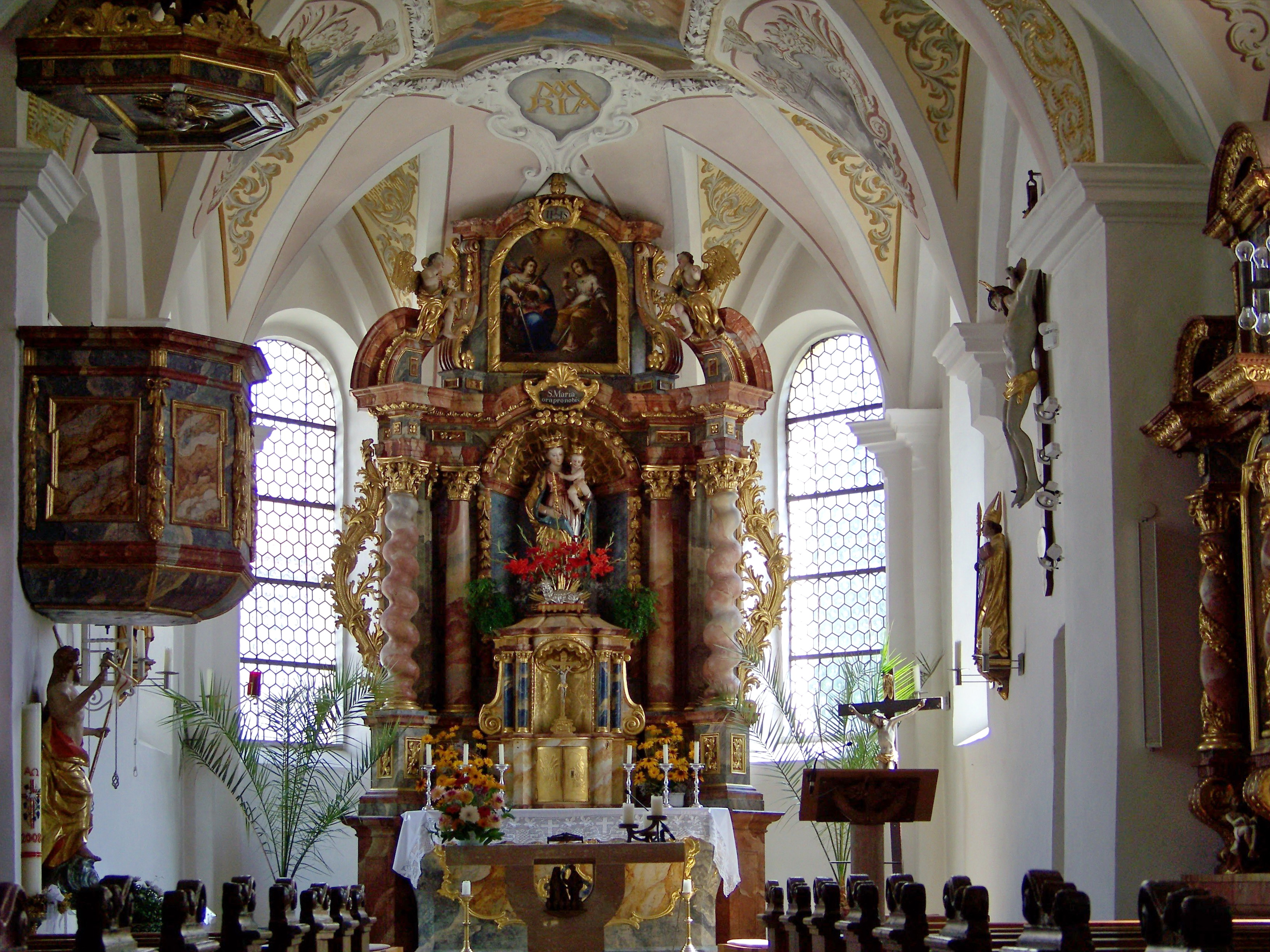 Herrngiersdorf, Semerskirchen, Am See 1. Katholische Pfarrkirche Mariä Himmelfahrt. Vom ehemaligen spätgotischen Netzgewölbe sind die Rippen und Konsolen abgeschlagen. Schwache, gefaste Wandpfeiler und ebensolche spitze Schildbögen gliedern die Wände des Chores. Gewölbe mit Rahmenstuck und Deckengemälden neueren Datums.